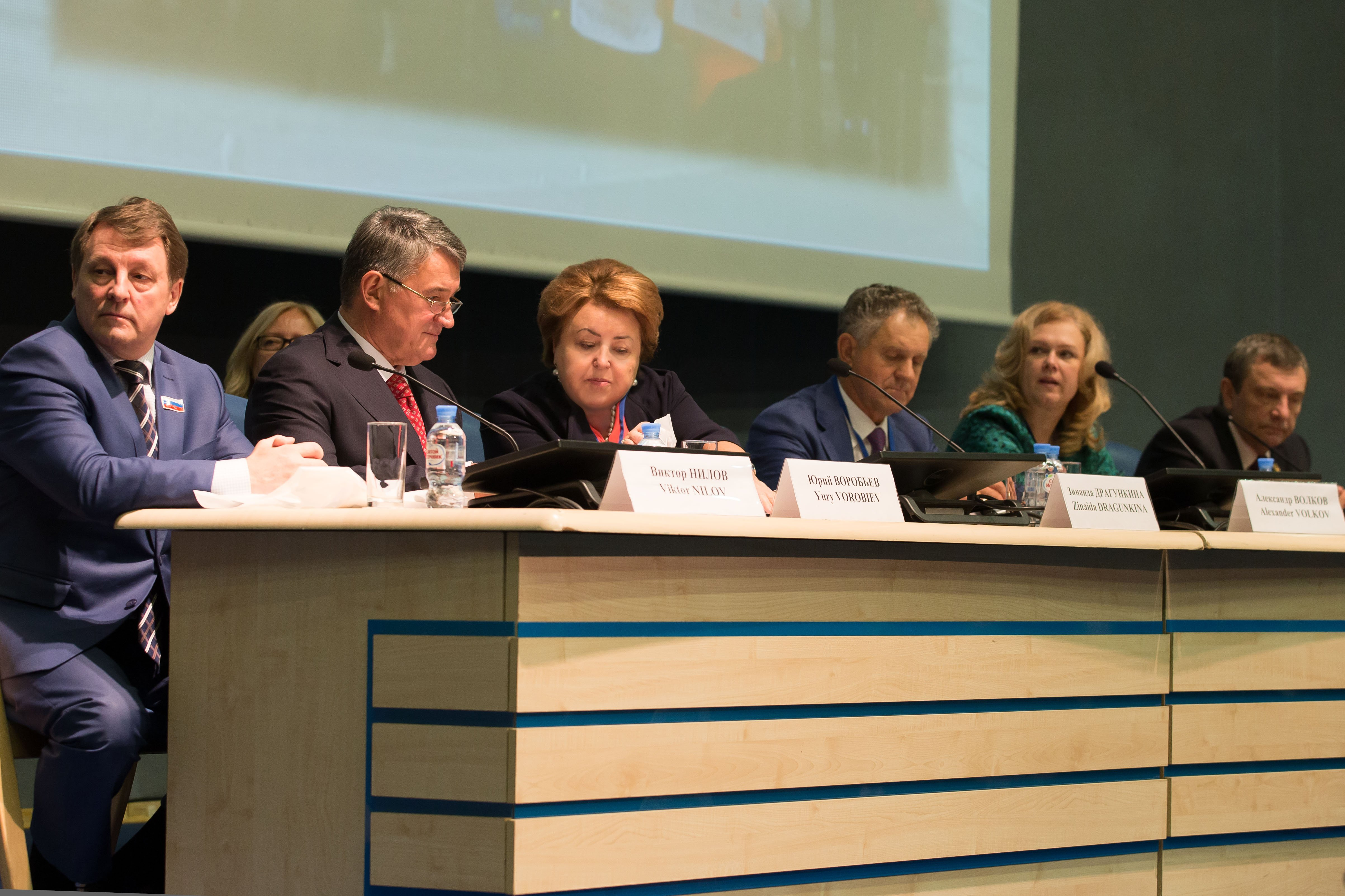 «Круглый стол» на тему «Доступная среда и безопасность дорожного движения» в рамках шестого Международного конгресса «Безопасность на дорогах ради безопасности жизни», сентябрь 2016 года.